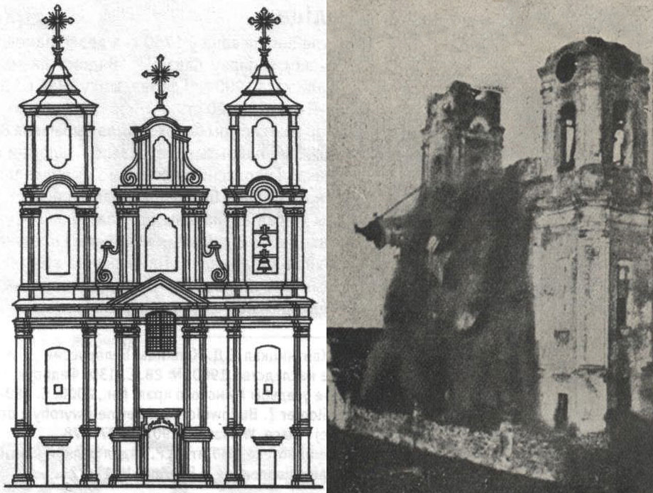 Беларуская (тарашкевіца): Маскалізацыя (русіфікацыя) Вялікага Княства Літоўскага. Места Друя. Касьцёл дамініканаў, помнік архітэктуры віленскага барока XVIII стагодзьдзя: аўтэнтычны выгляд (налева) і ў час руйнаваньня (направа)